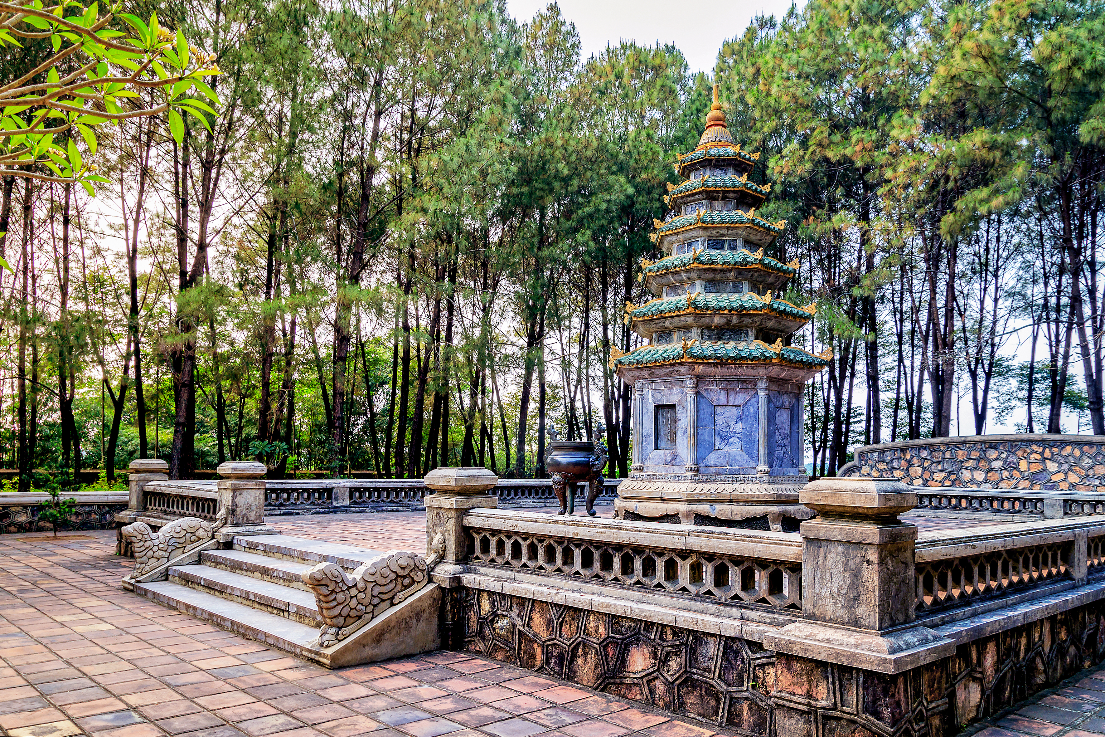 Tháp mộ Hòa thượng Thích Đôn Hậu (1905-1992) trong khuôn viên chùa Thiên Mụ, TP Huế, Việt Nam.